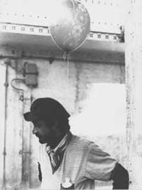 Passeggio per i campi con il cuore sospeso nel sole. Il pensiero, avvolto a spirale, ricerca il cuore della nebbia.